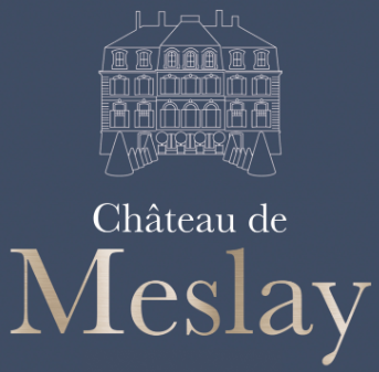 Logo du Château de Meslay 41100